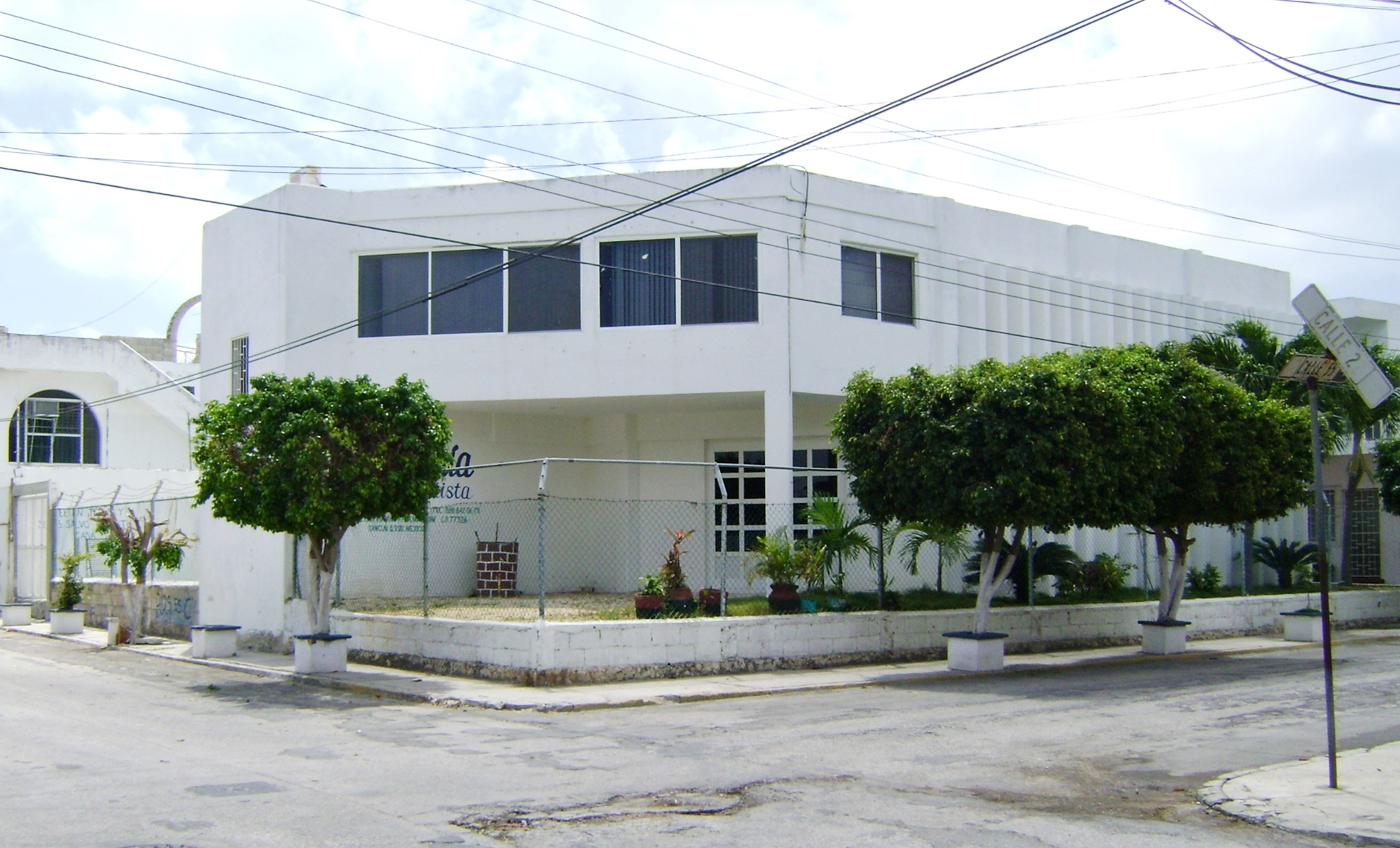 Iglesia Bautista Antioquia de Cancún Q. Roo, A.R. SGAR/13:957/2001 Reg. 74 Mza. 6 Lts. 21-23